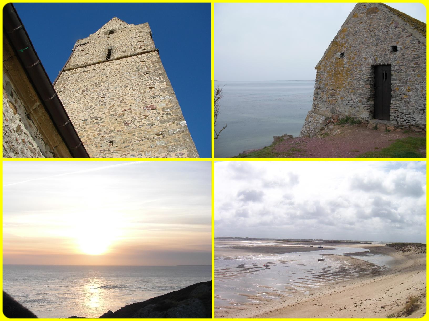 quatre vues assemblées permettant de comprendre le lien entre architecture et espaces maritimes dans la commune